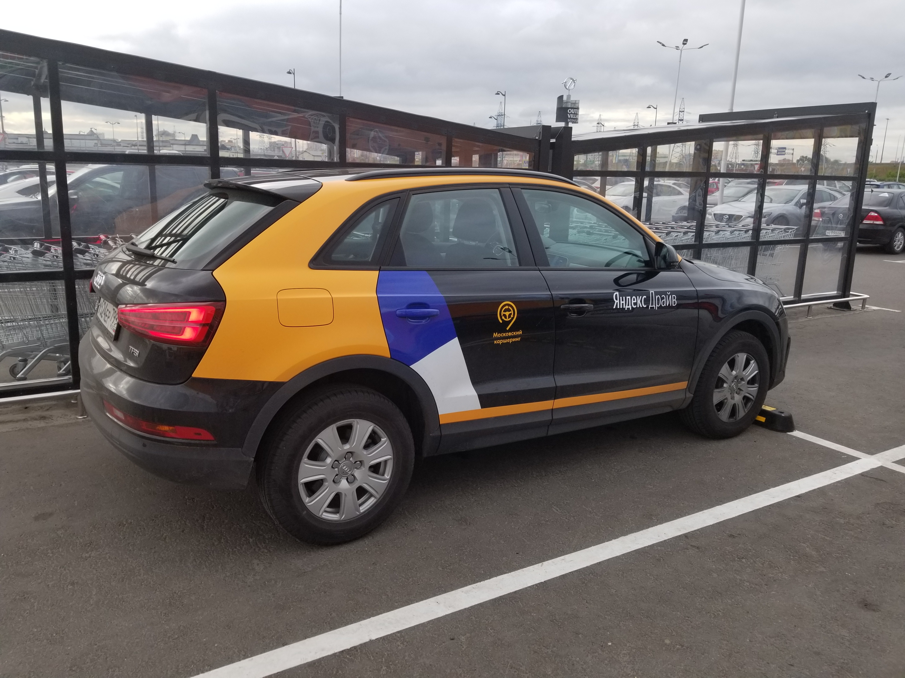 Audi Q3 сервиса Яндекс.Драйв на парковке в Котельниках